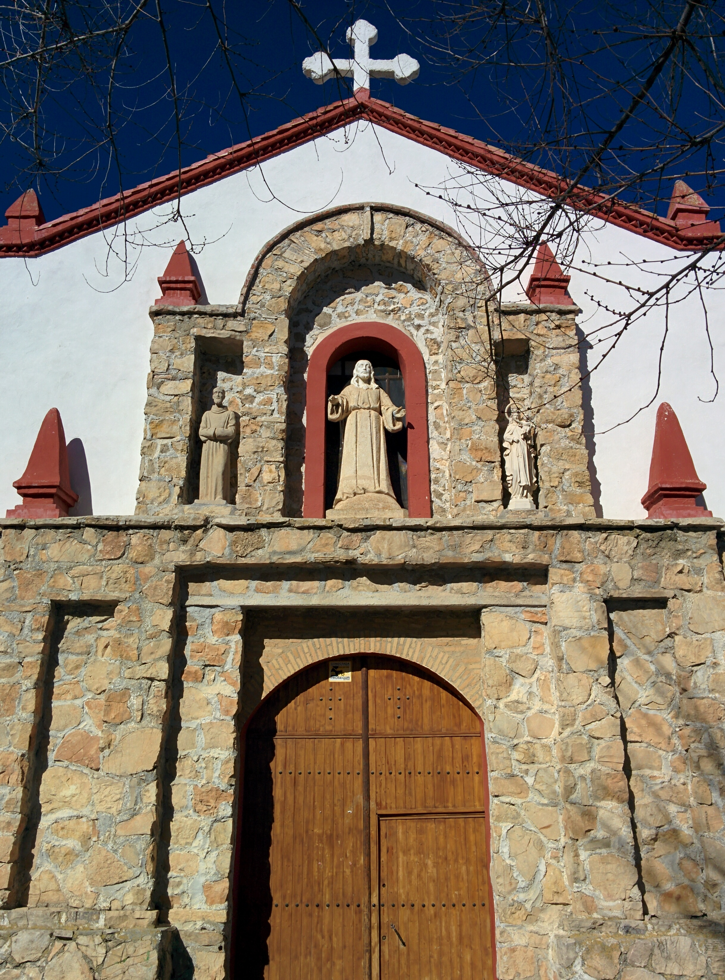 Iglesia de Nuestra Señora del Rosario, Dehesas Viejas (Granada, España).